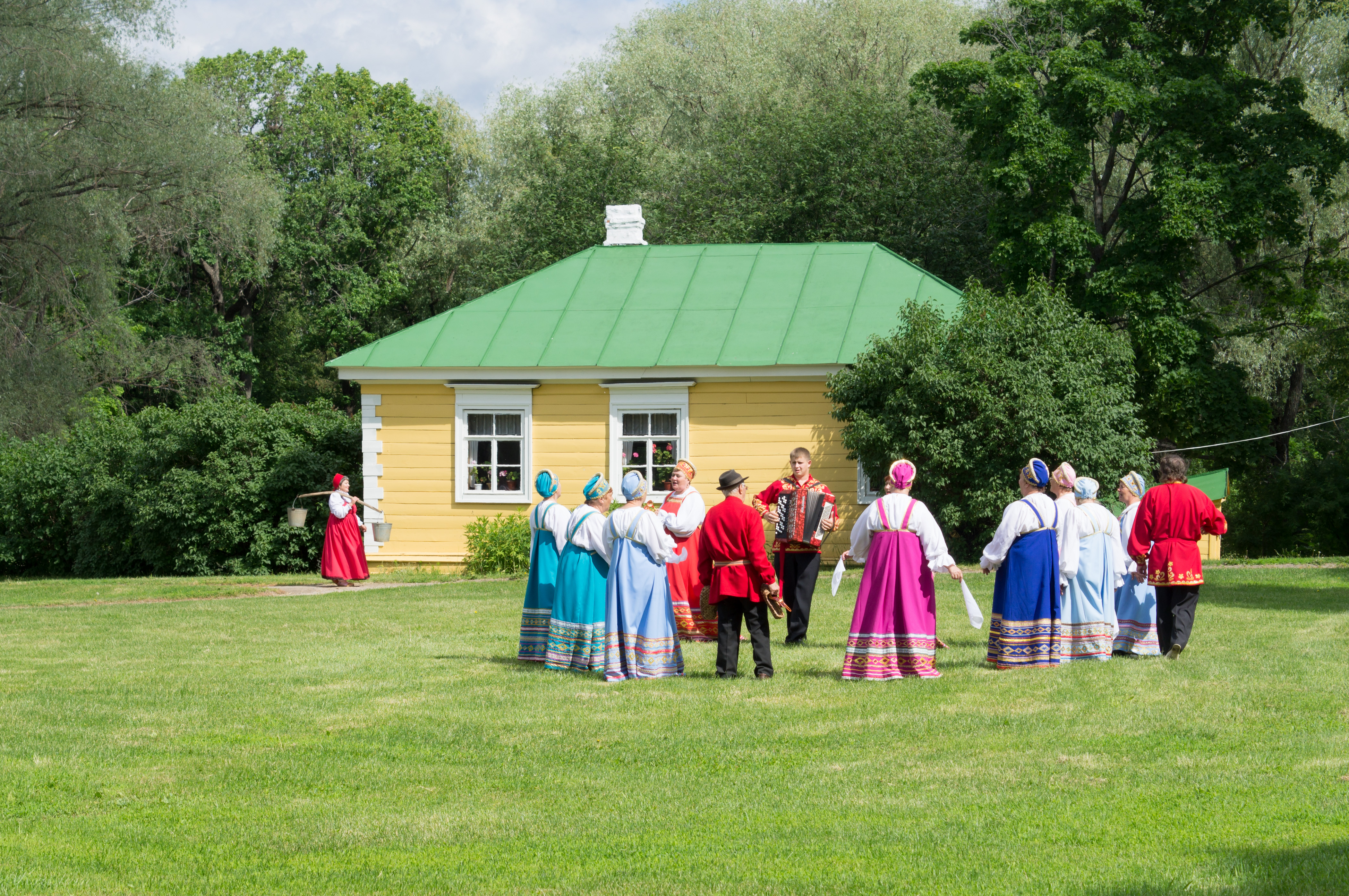 Большое Болдино. На Пушкинском празднике поэзии.